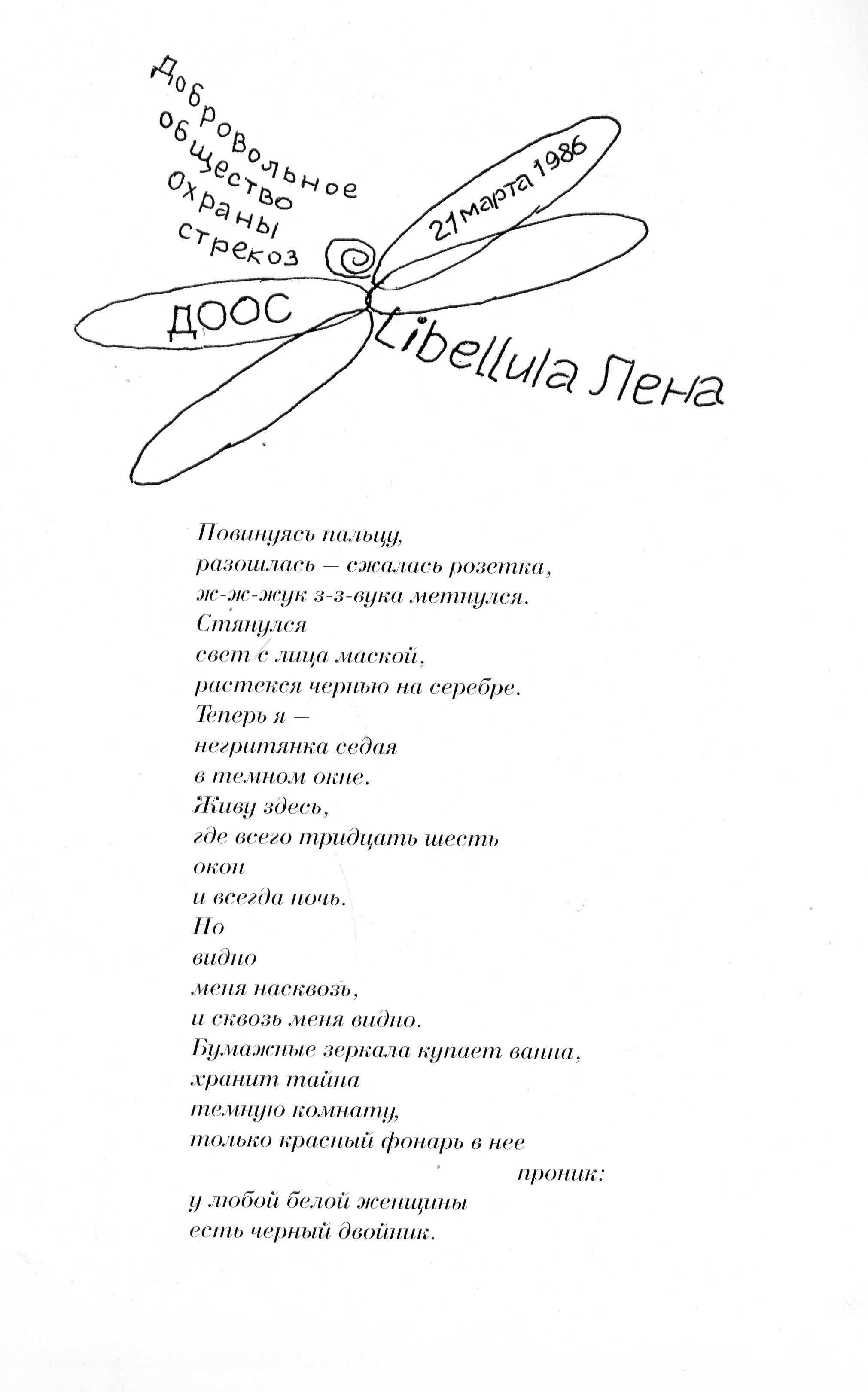 Елена Кацюба. Стихотворение, посвященное фотографу известинцу Виктору Ахломову.